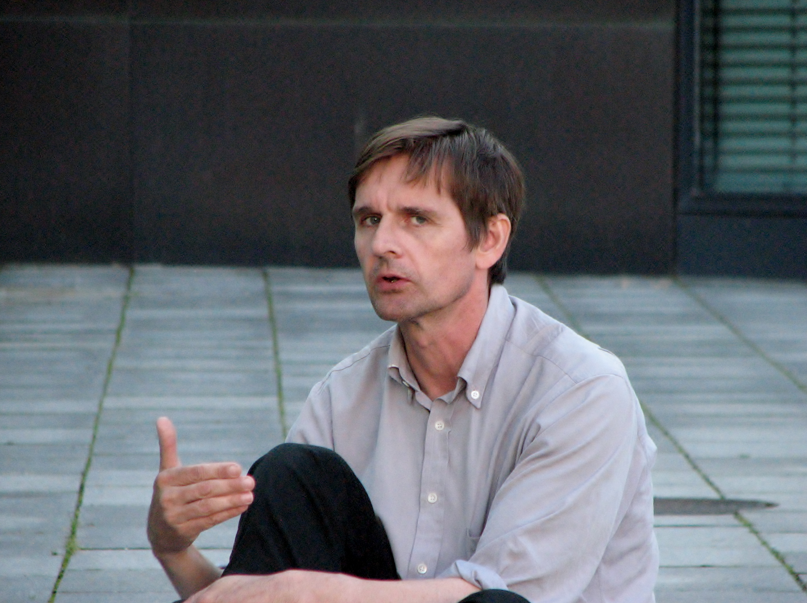 Paul Elliman esinemas KUMU hoovis